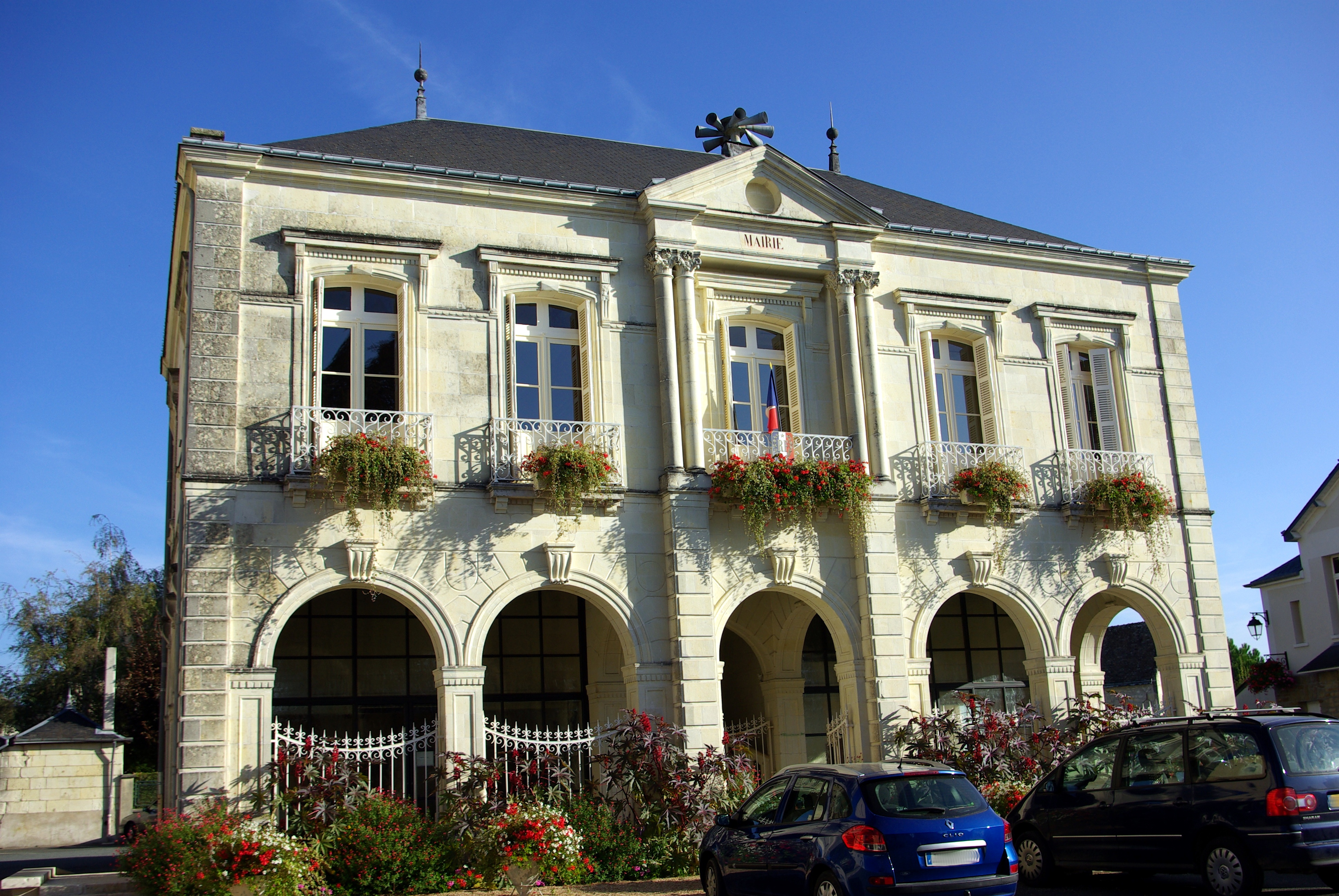 Mairie de Restigné.